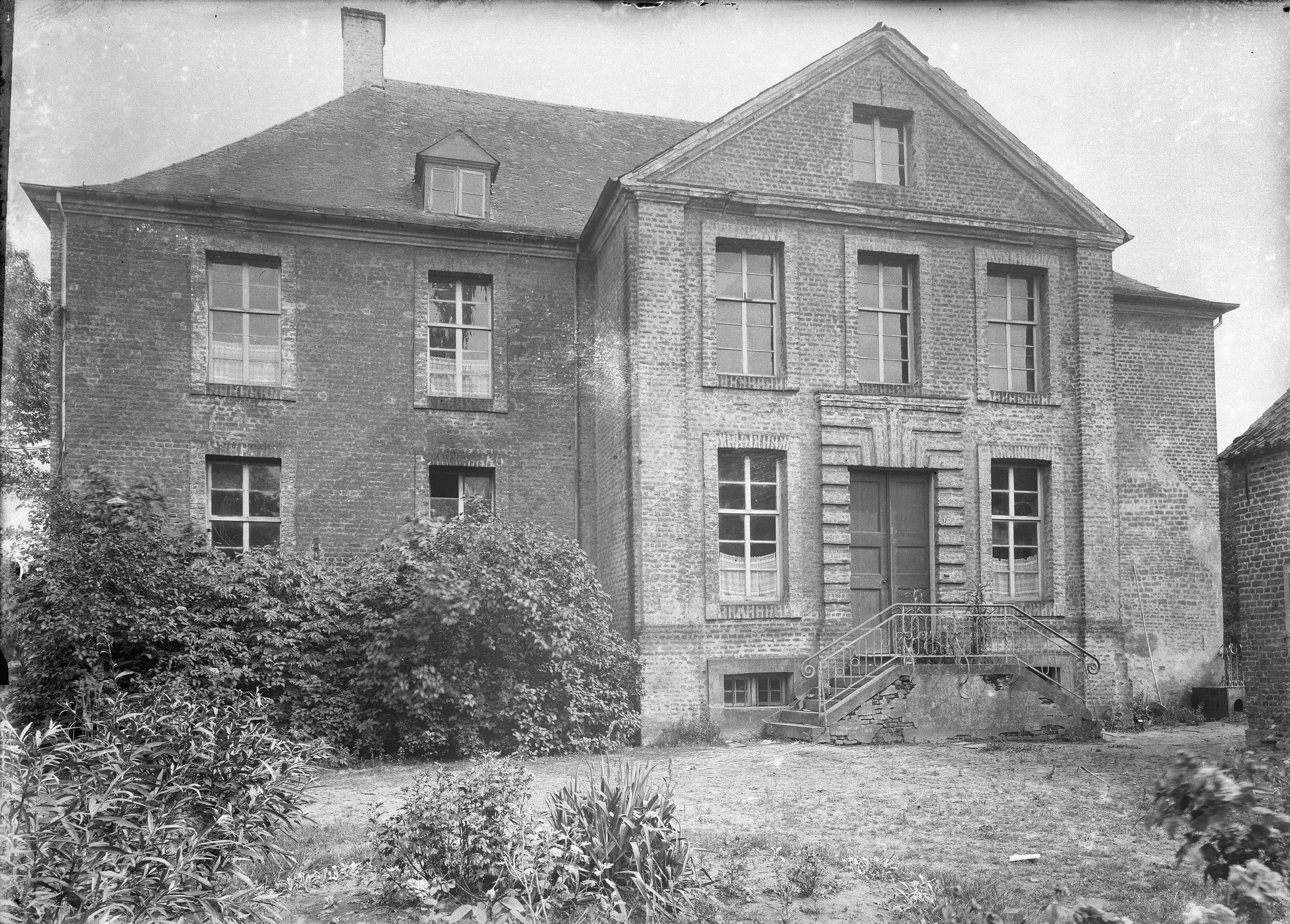 Kasteel: Exterieur vanuit het noord-westen